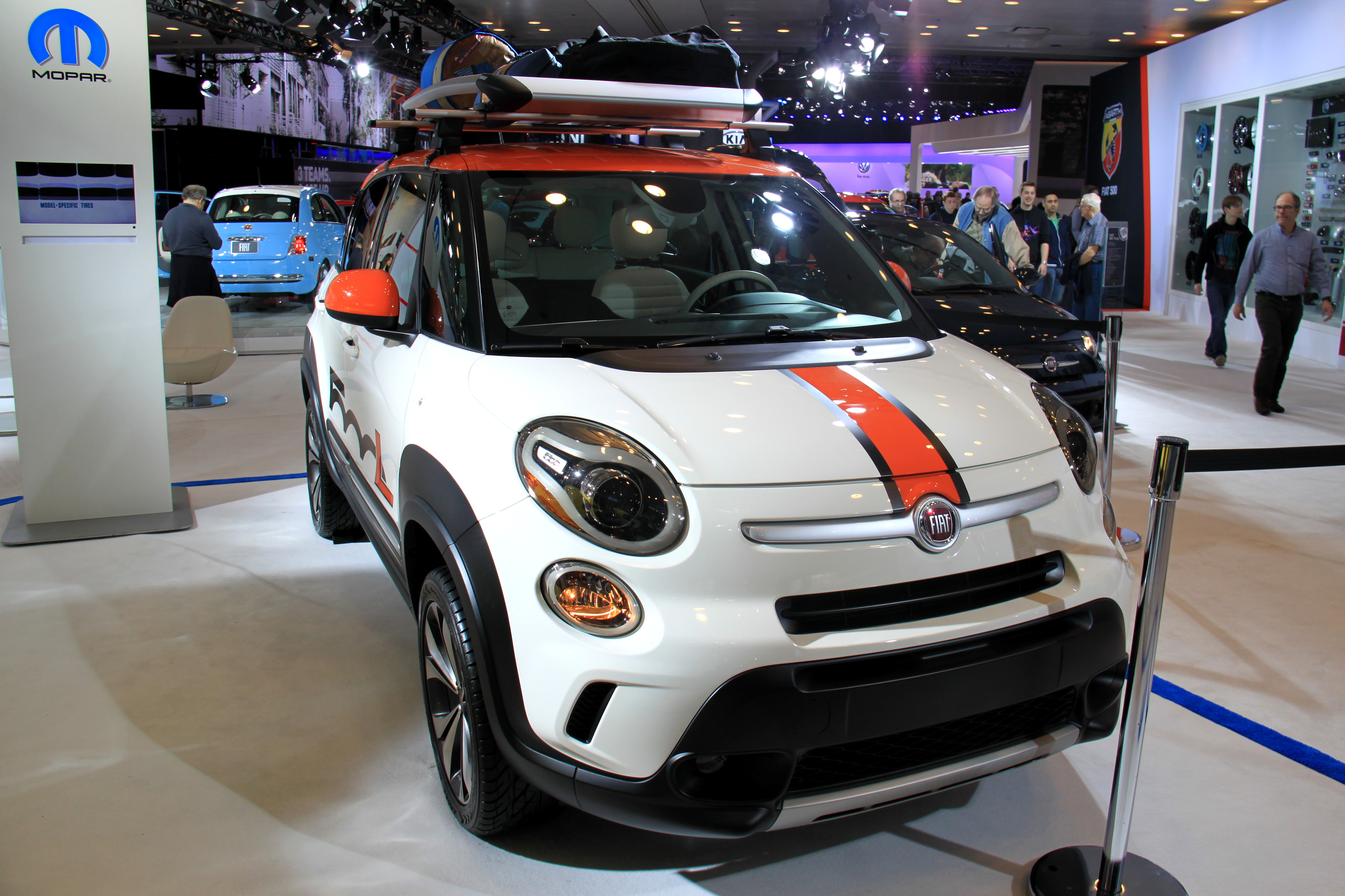 Fiat 500L Trekking by Mopar al Salone Internazionale dell'Automobile di New York